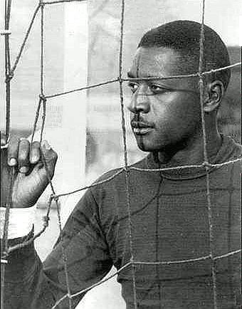 Moacir Barbosa Nascimento, mais conhecido como Barbosa (Campinas, 27 de março de 1921 — Praia Grande, 7 de abril de 2000), foi um futebolista brasileiro que atuava como goleiro. Embora tenha sido considerado um dos maiores goleiros de sua época, Barbosa é mais lembrado por sua participação na derrota da Seleção Brasileira na final da Copa do Mundo de 1950, contra o Uruguai, em particular pelo segundo gol uruguaio, marcado por Alcides Ghiggia.